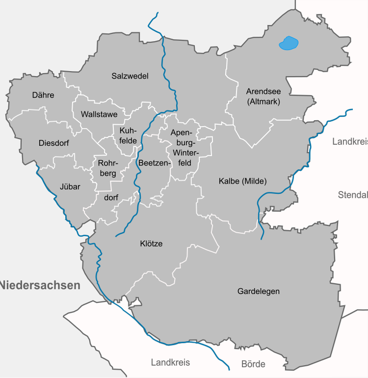 Salzwedel_KR